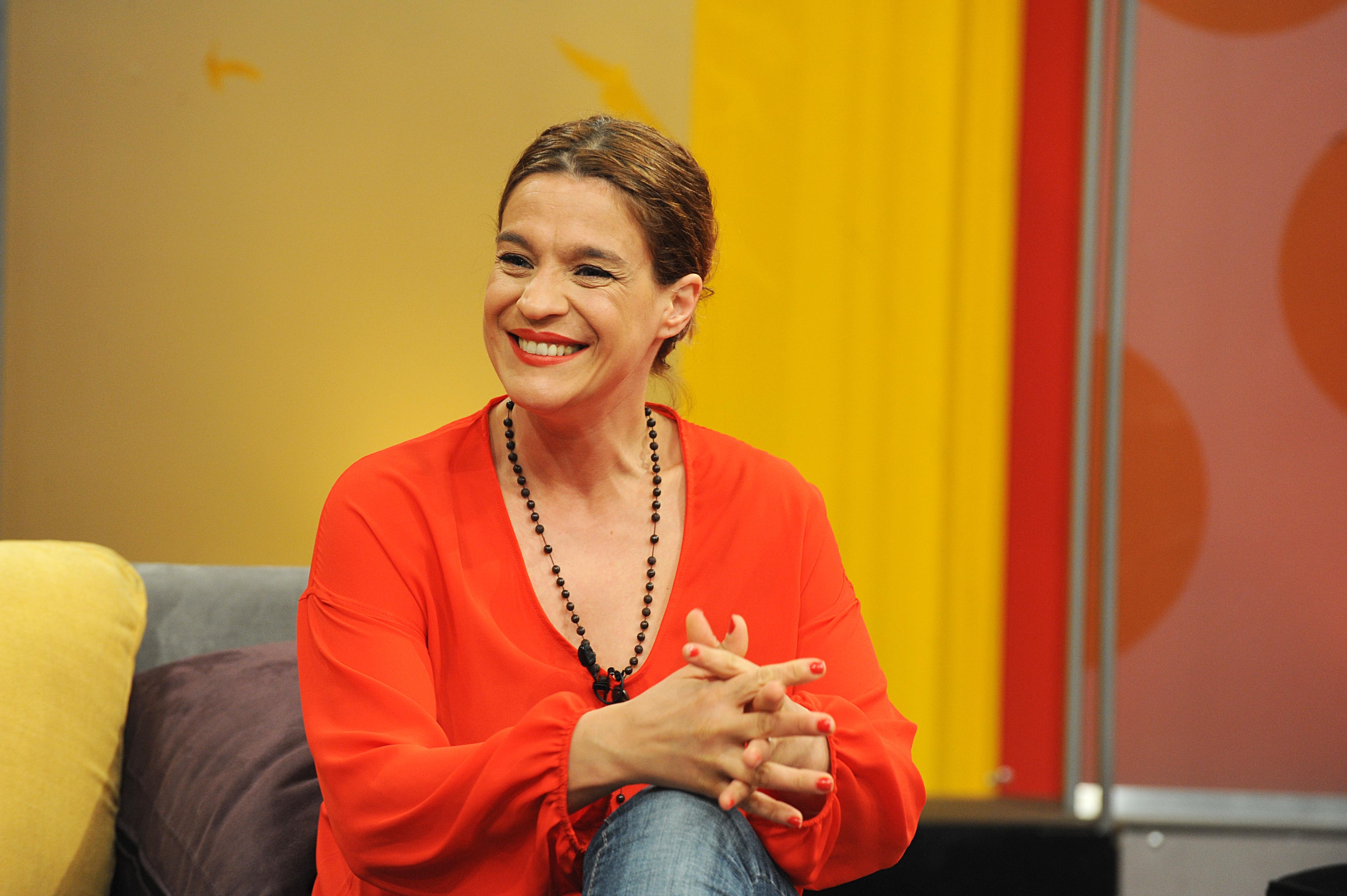 Leticia Bredice